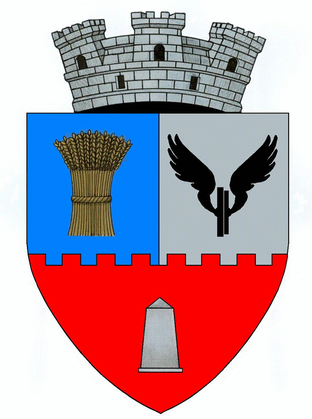 Stema Oraşului Curtici